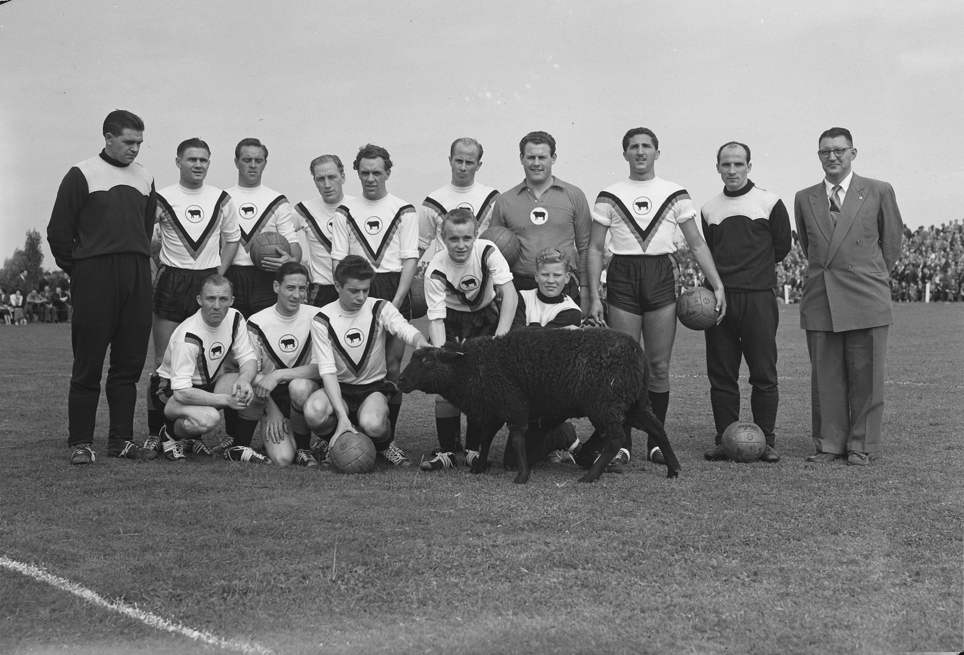 Beroepsvoetbal Amsterdam tegen Rapid (Heerlen) Duivendrec amateur elftal